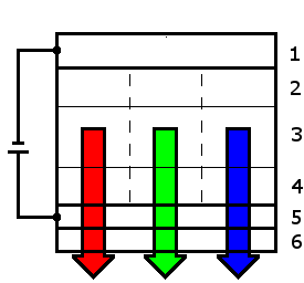 Schema einer OLED; Kathode (aus Metall) (1), Farbstoff-Film: Elektronenabgabe (2), Aussendende Schicht - Exzitone (3), Lochinjektion (4), Anode (ITO) (5), Trägermaterial (6)